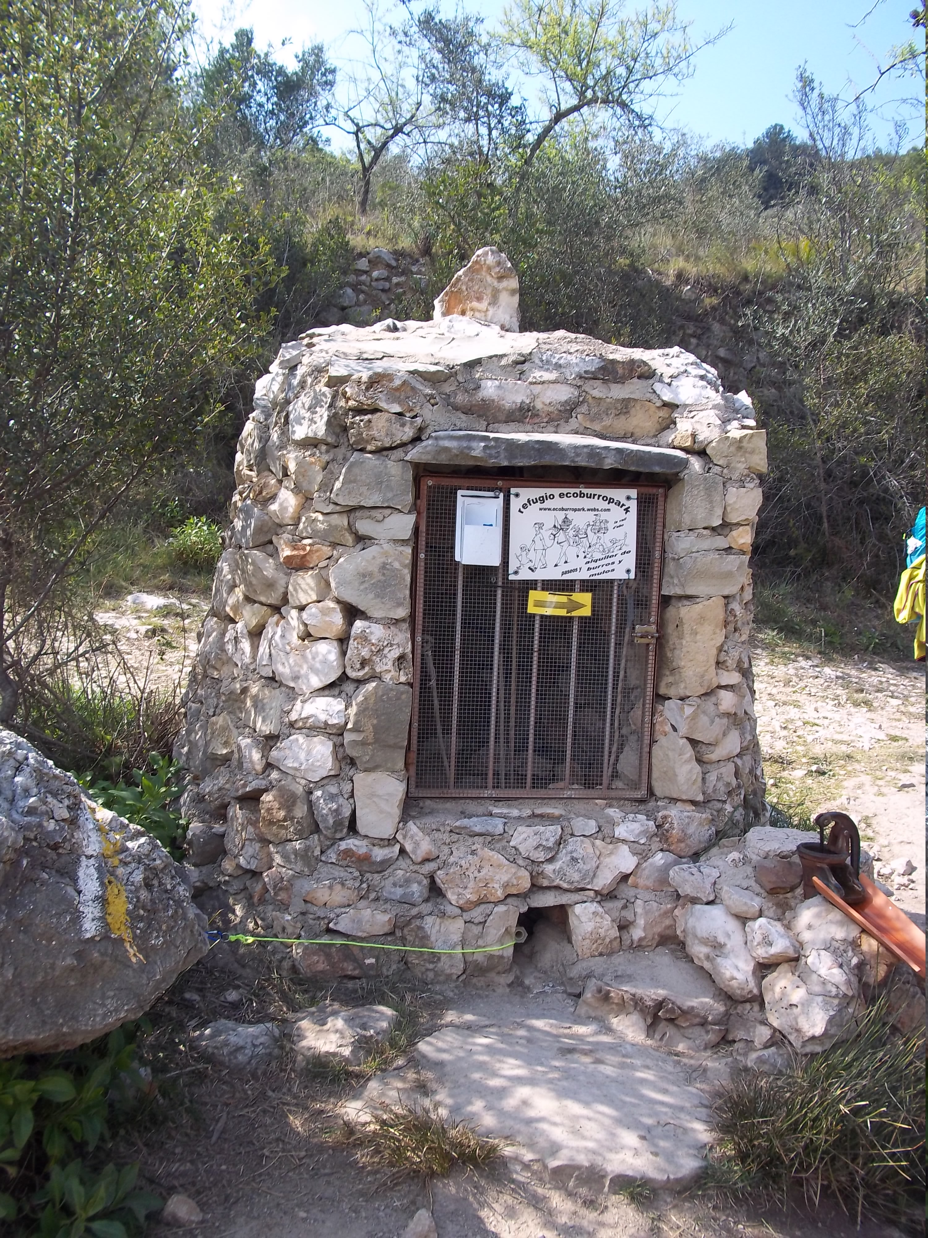 Pou de la Juvea, a prop del Poble d'Enmig de les Juvees, camí del Barranc de l'Infern a la Vall de Laguar